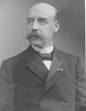 Edzard Tjarda van Starkenborgh Stachouwer